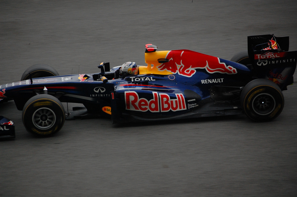 Vettel, Malaysia F1 GP 2011